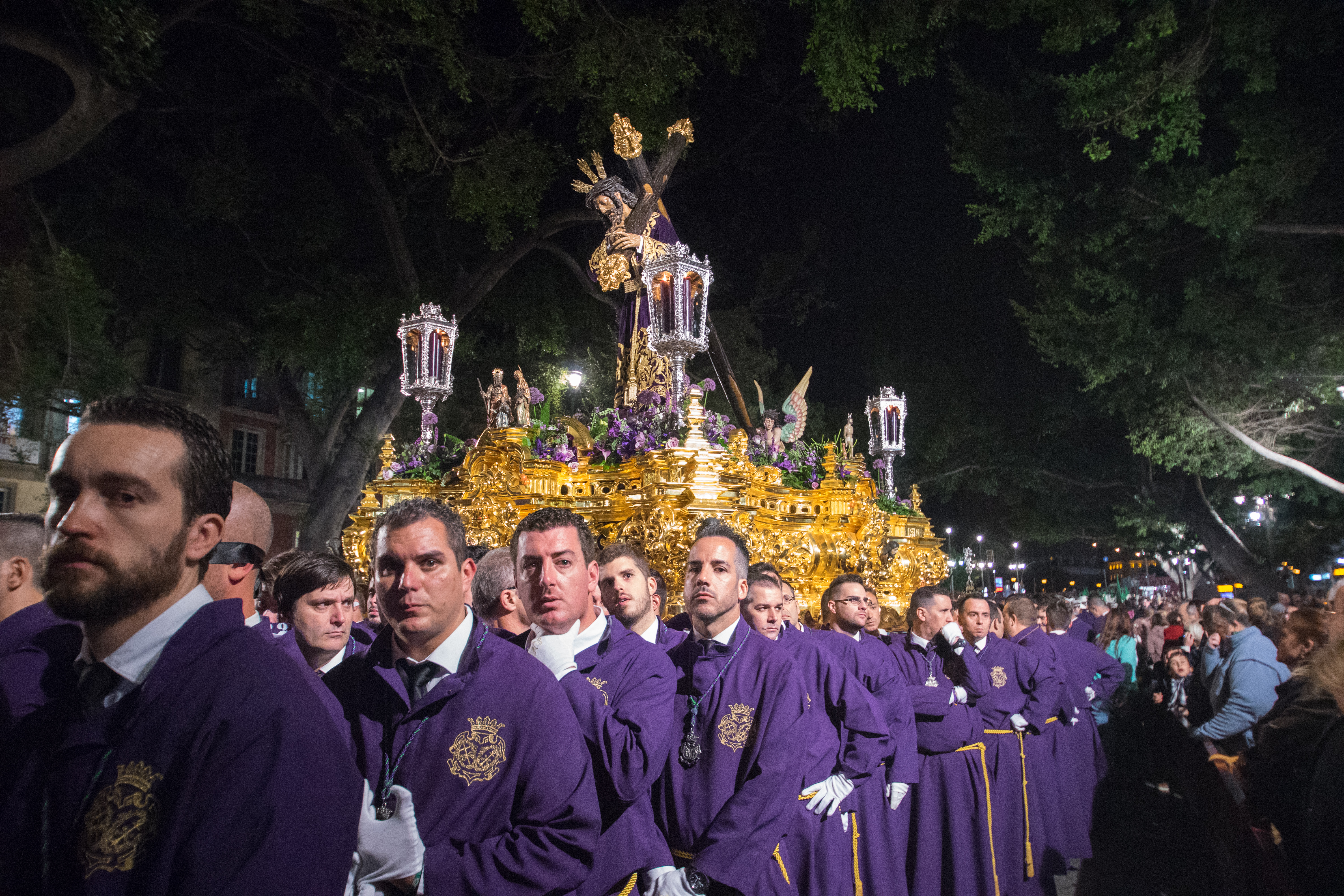 Hermandad de Culto y Procesión de Jesús Nazareno del Perdón, María Santísima de Nueva Esperanza, Santa Ana y San Joaquín This is a photography of a Folklore festival in Spain (Wikidata id Q9075883).